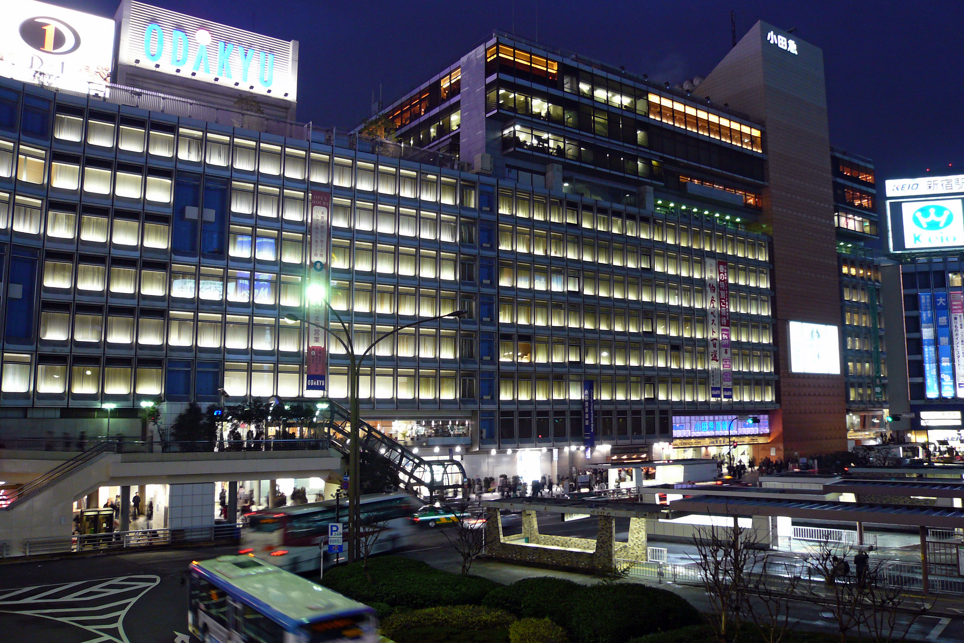 Shinjuku station in Shinjuku-ku, Tokyo, Japan